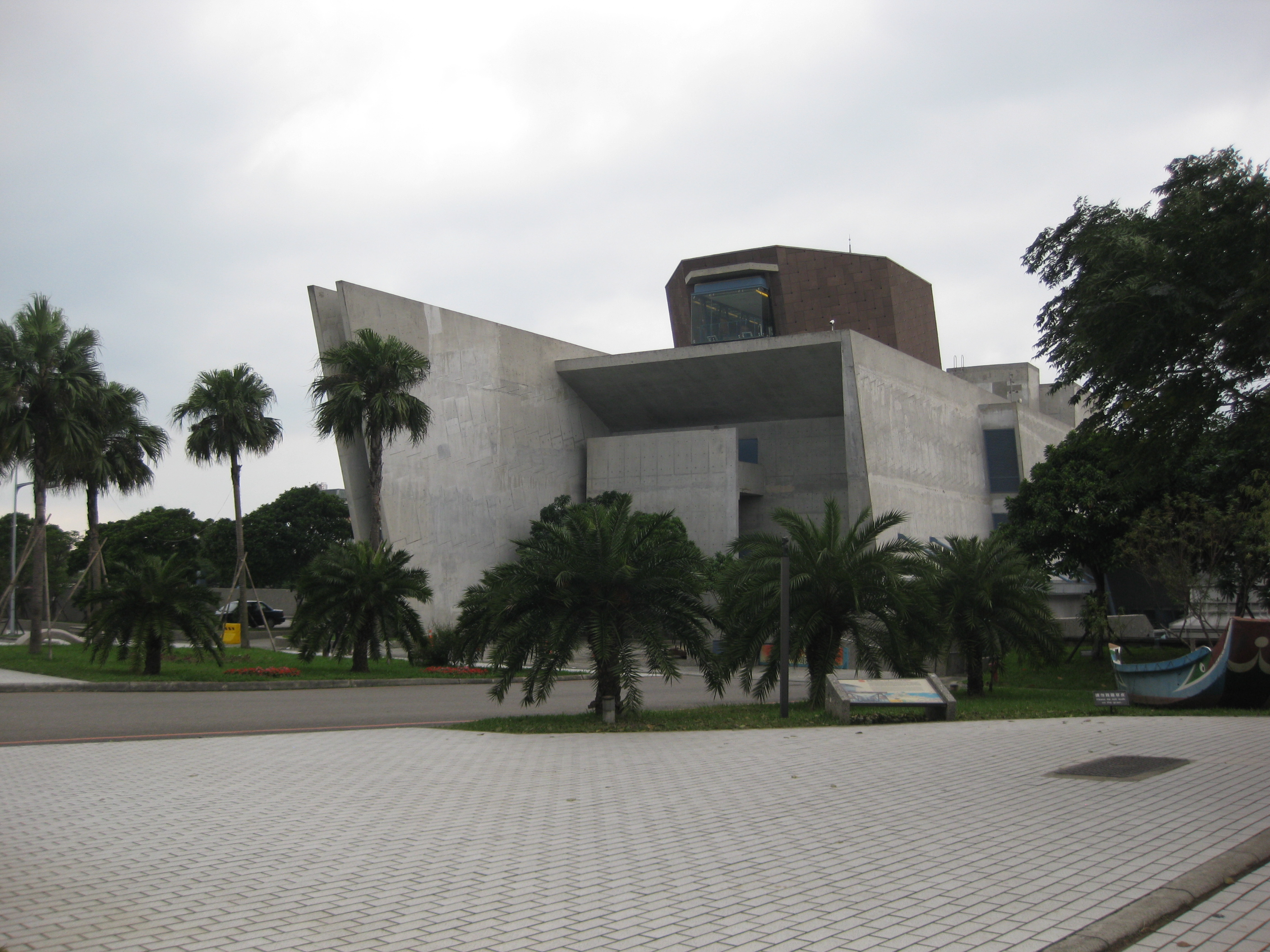 十三行博物館外觀